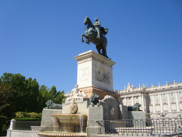 Estatua de Felipe IV de España (1605-1665)